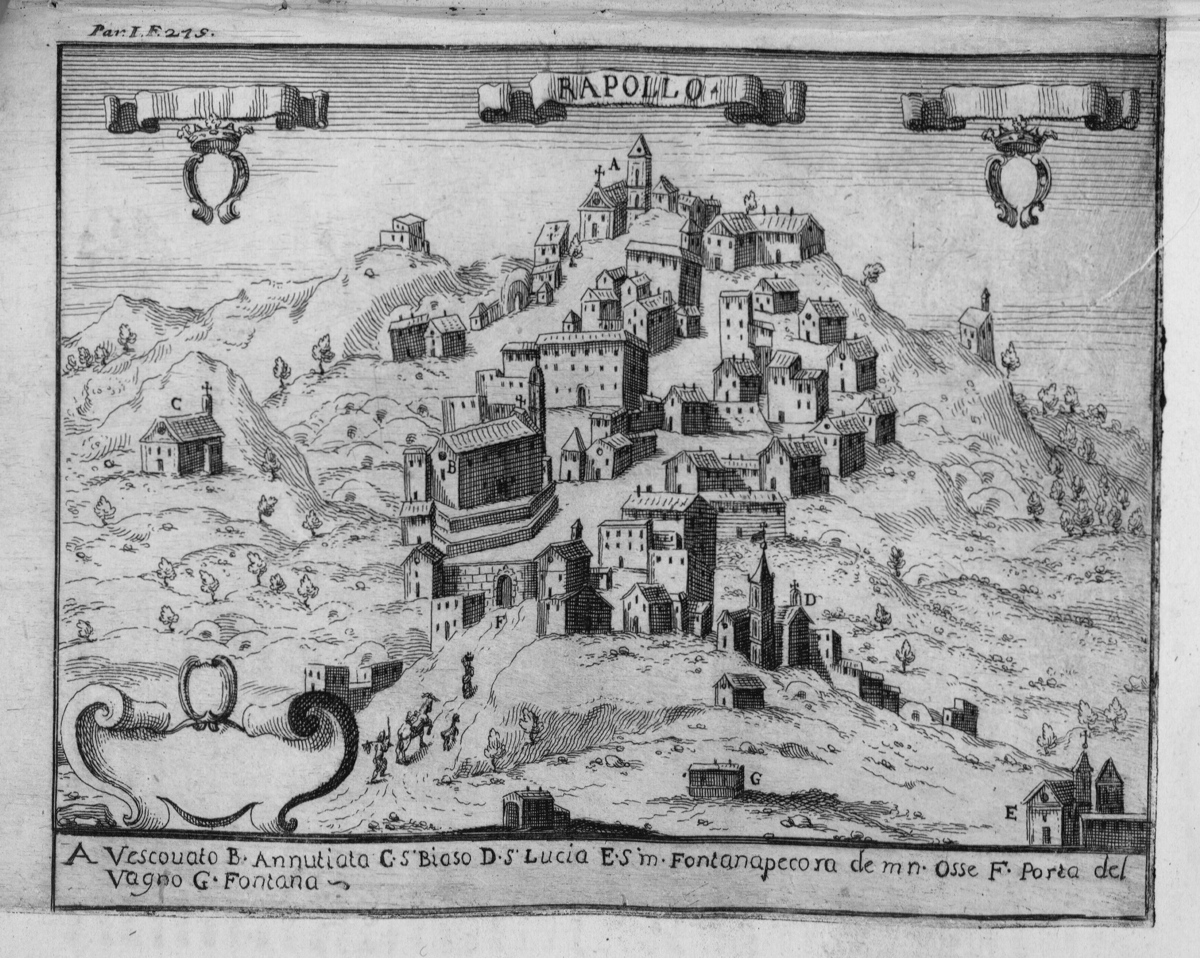 Autor: Pacichelli, Giovanni Battista, 1641-1702 Descripción bibliográfica: Il regno di Napoli in prospettiva : diviso in dodeci provincie, in cui si descrivono la sua Metropoli Fidelissima città di Napoli ... Opera postuma divisa in tre parti / dell'abatte Gio. Battista Pacichelli ; Parte prima [-terza] ... Del regno di Napoli in prospettiva / dell'abate Pacichelli. Parte prima. - In Napoli : nella Stamperia di Michele Luigi Mutio, 1703. - v. : principalmente il.; 4º . - Inic. adorn. y frisos dec. - Grab. calc. y h. pleg. grab. calc. de mapas de Cassianus de Silva. Ilustrador: Cassiano De Silva, Francesco, il. Impresor: Muzio, Michele Luigi, imp. Lugar de impresión: Italia. Nápoles Localización: Vea la ilustración en su contexto